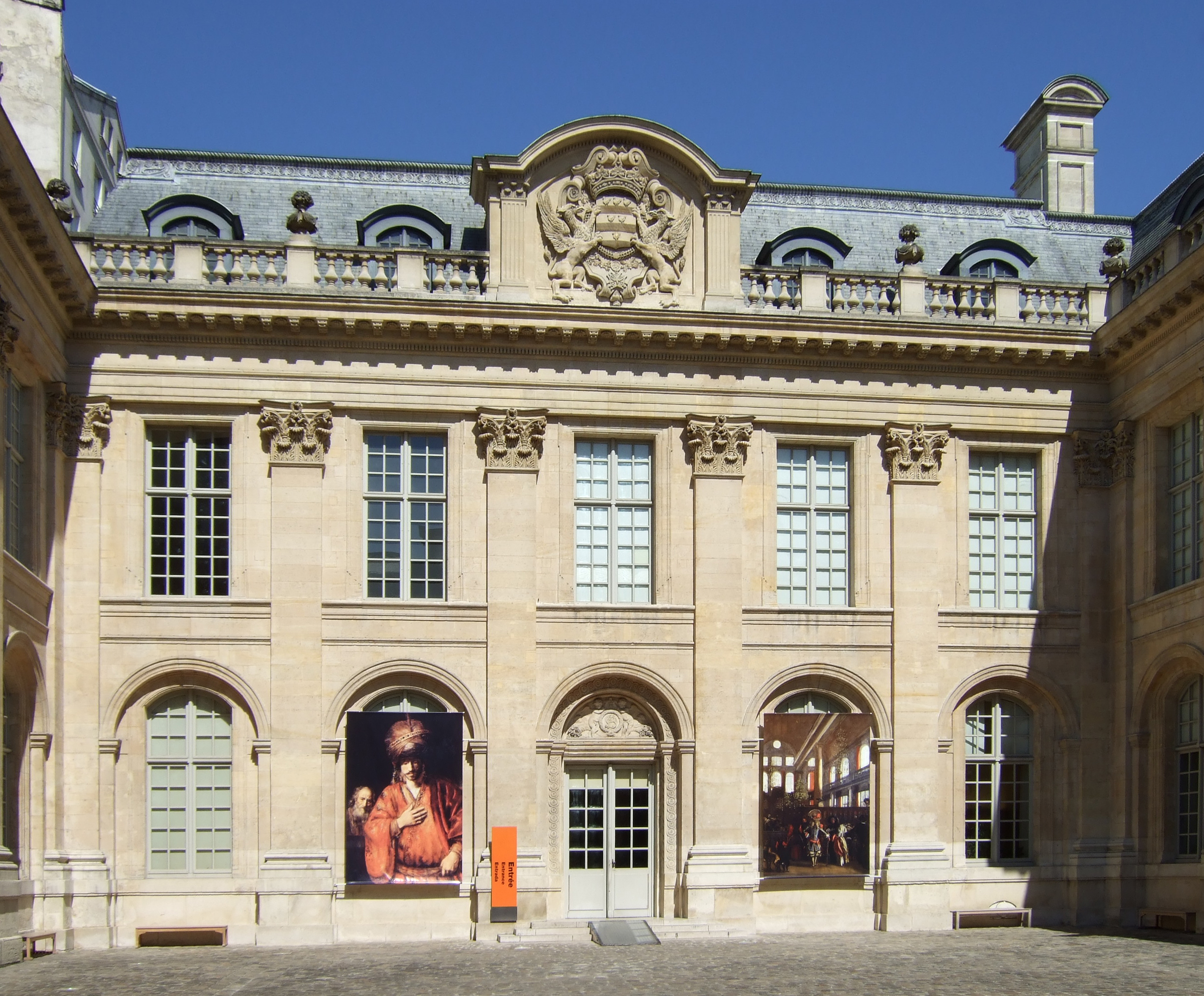 Paris - Hôtel de Saint-Aignan - Museé d'art et d'histoire du Judaïsme [1]